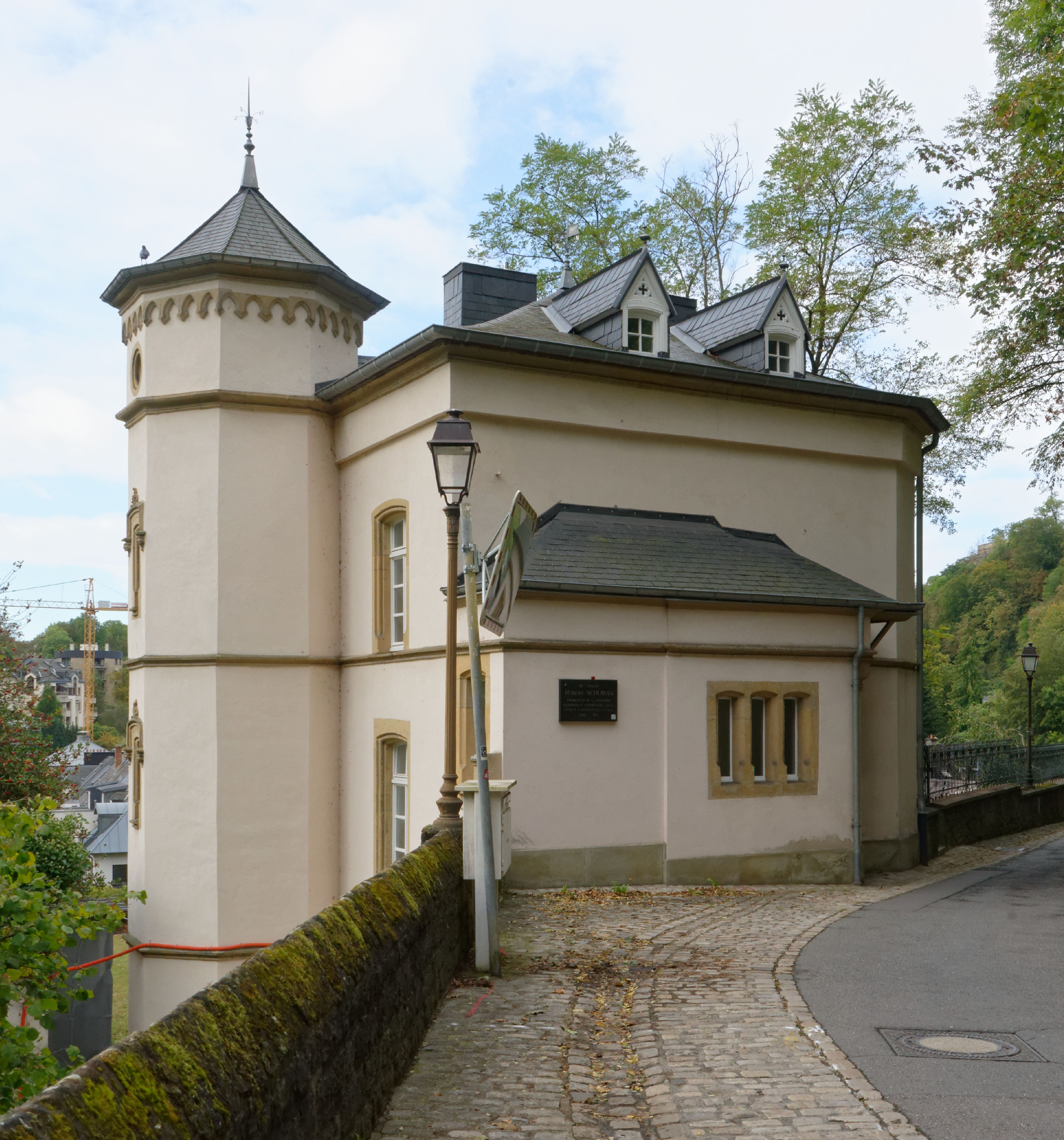 Malakoff-Turm, Luxemburg